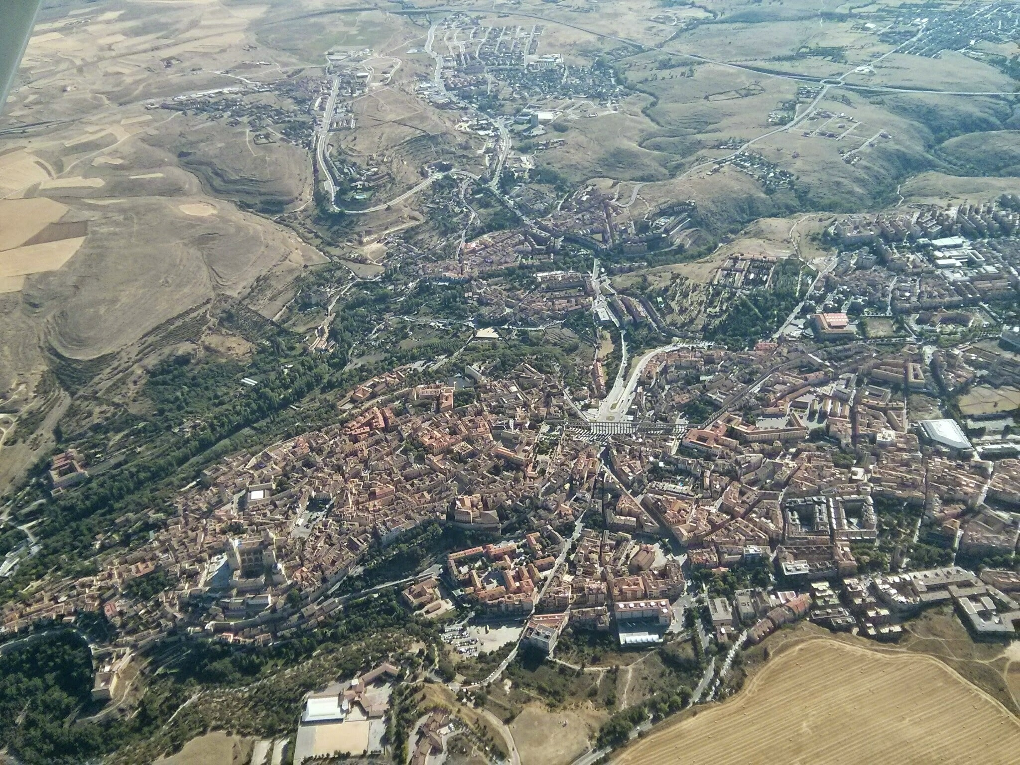 Vista aerea de Segovia